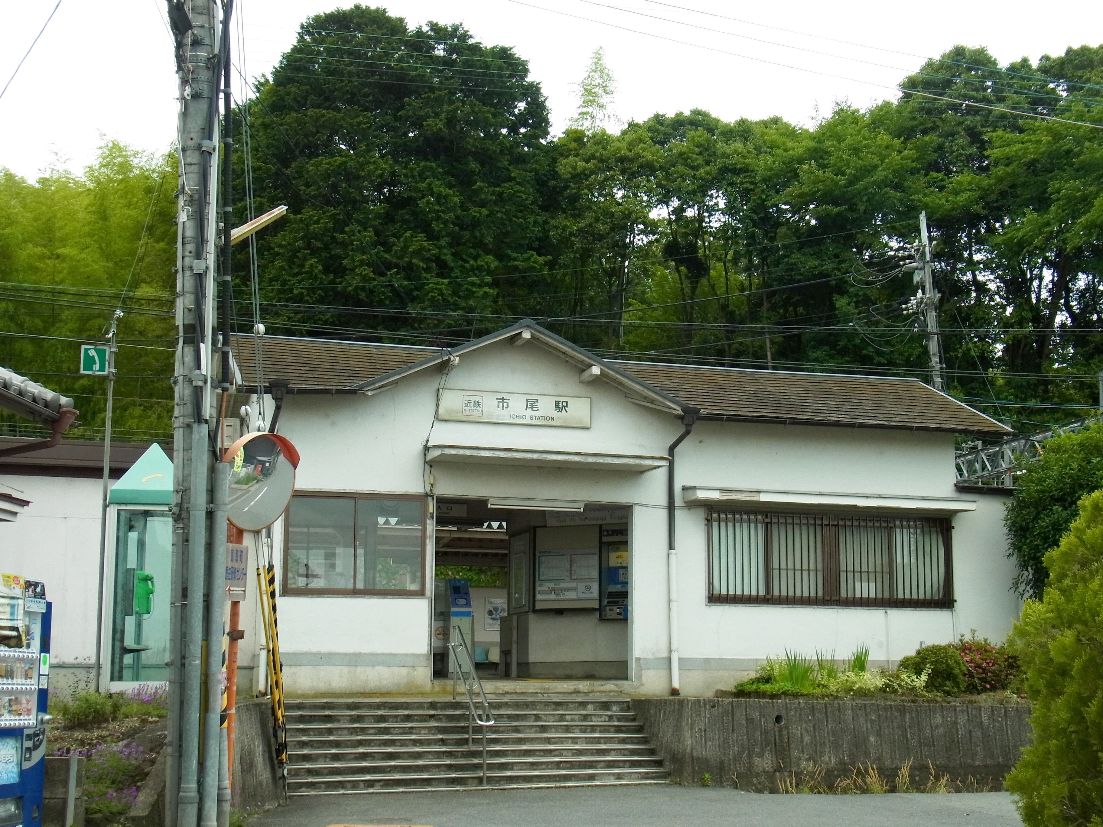 近鉄吉野線 市尾駅 Ichio station 2012.6.14